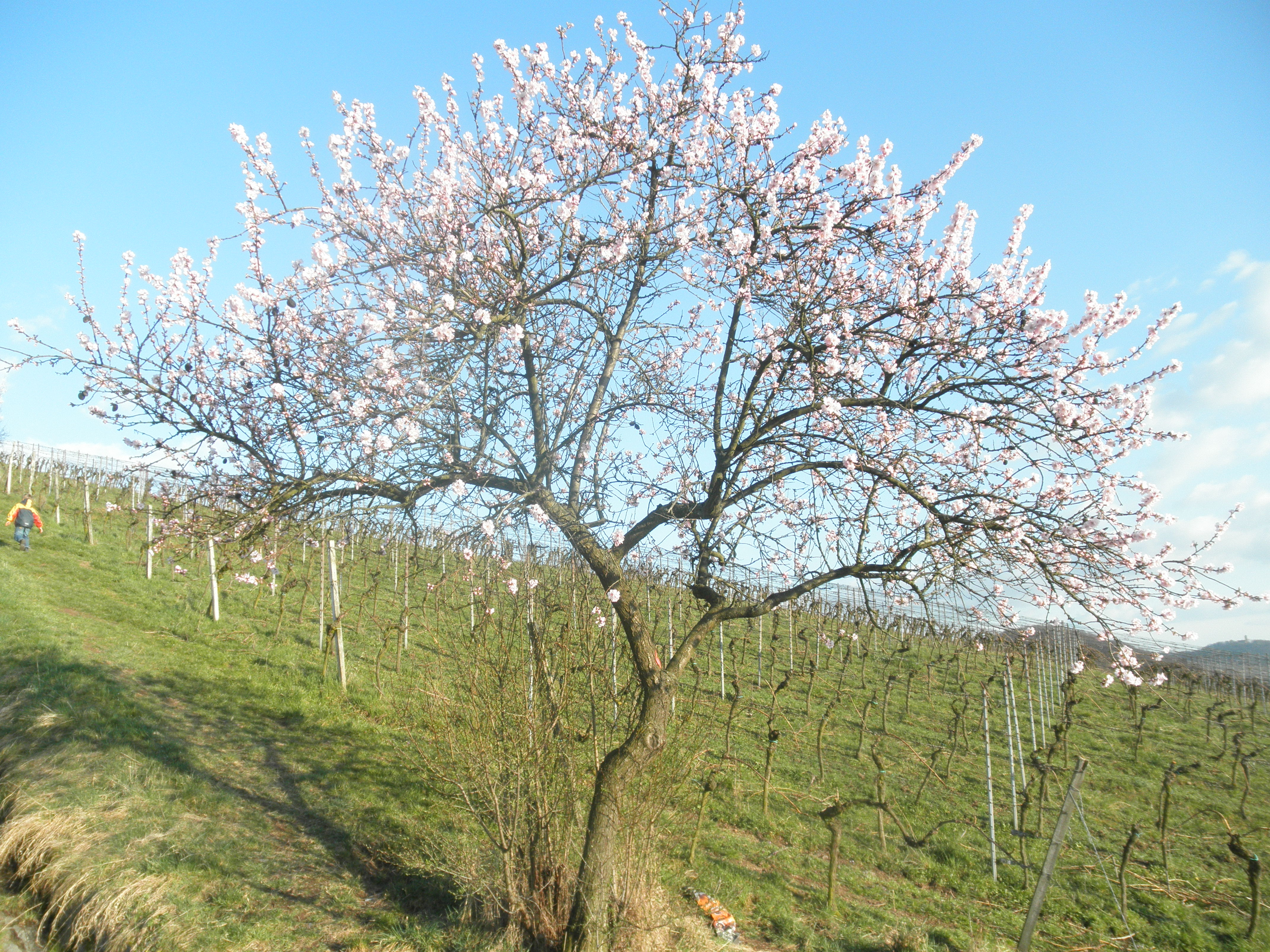 floranta migdalujo (prunus dulcis) en vitejo de Bensheim (Germanio) printempe 2011